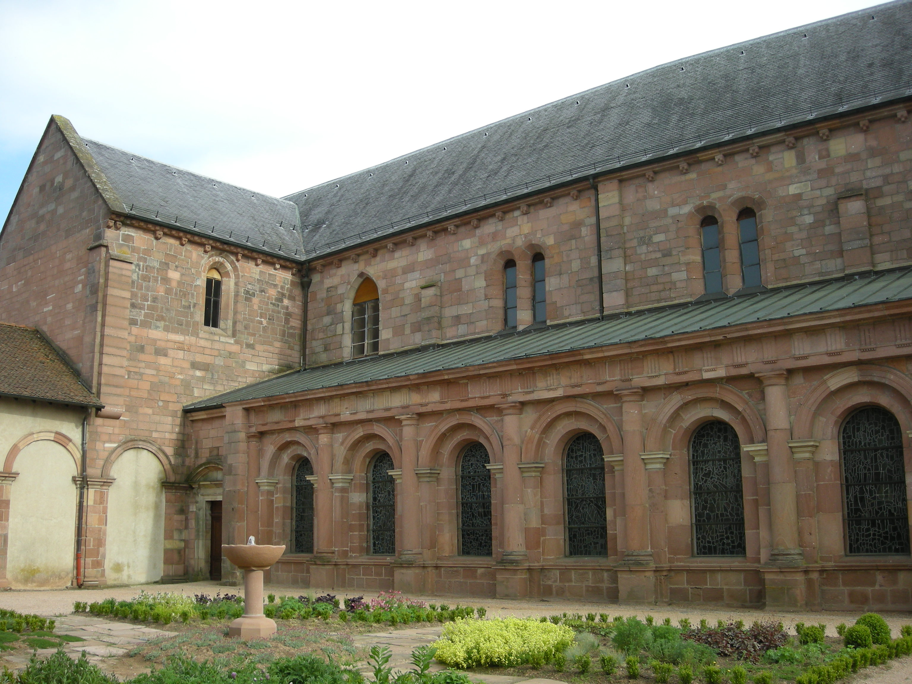 Aile nord de l'abbaye d'Etival-Clairefontaine (Vosges)